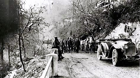 Na cesti proti Podbrdu, oktober 1917